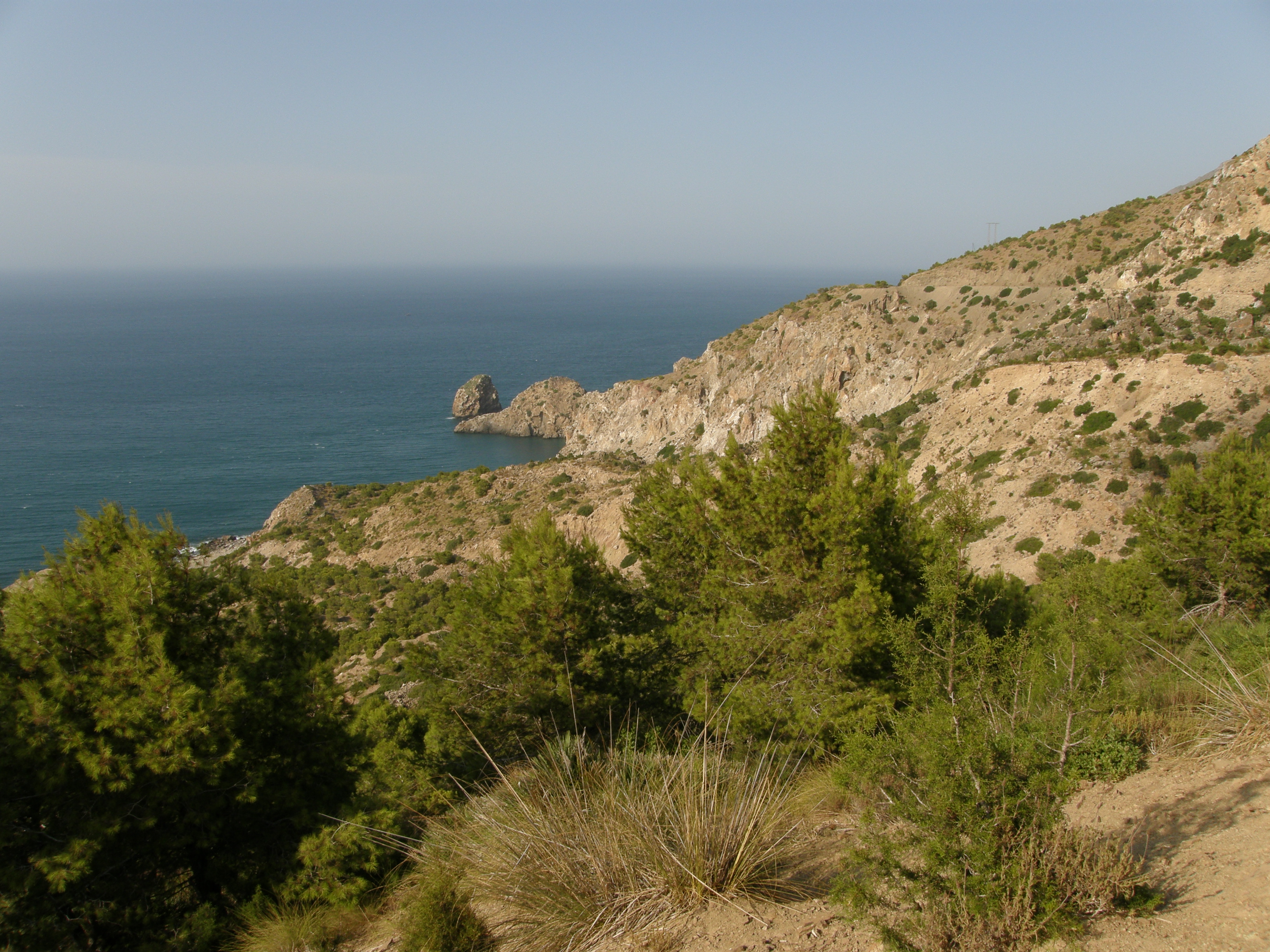 Peñón de Alhucemas, con Pinus halepensis y Tetraclinis articulata